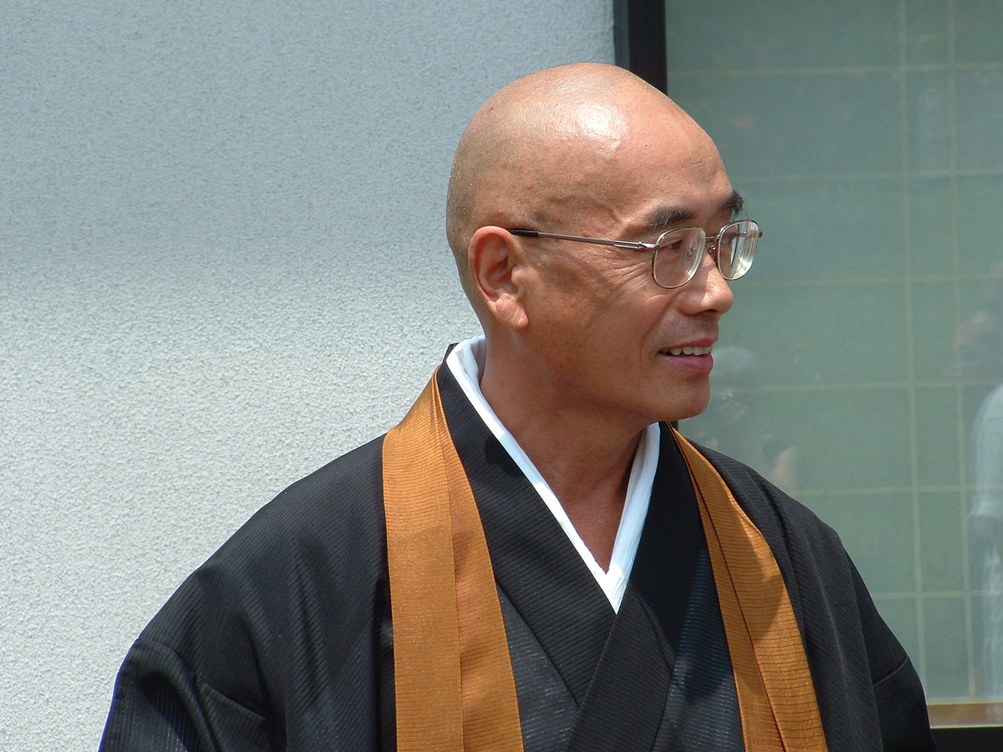 Primo piano di Watanabe roshi a Kyoto nel 2004